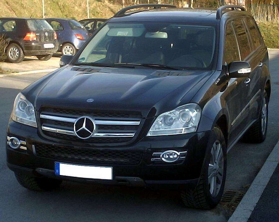 Mercedes GL-Klasse